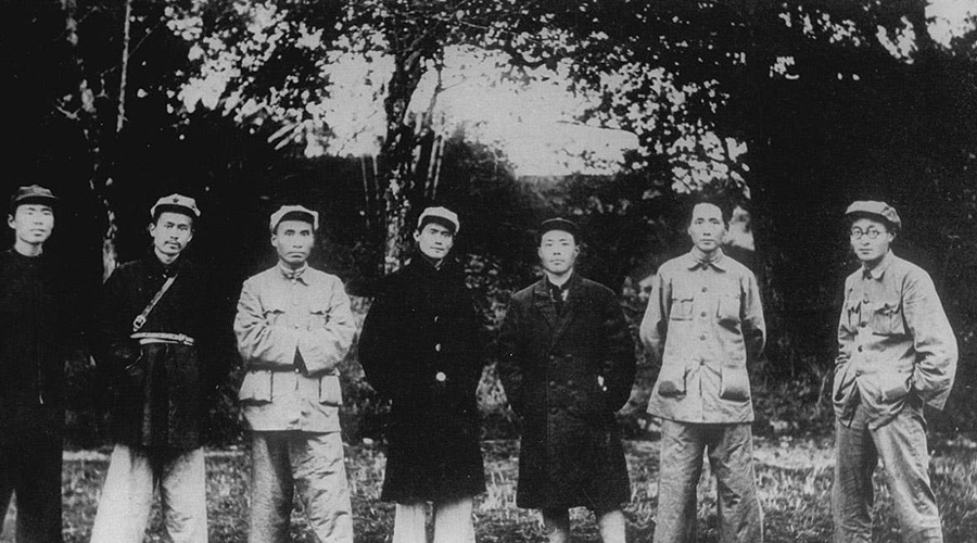 1931年11月1-5日，中国共产党中央苏区第一次代表大会在叶坪召开，为一苏大的召开作最后的准备。图为中共苏区中央局委员合影，从左至右为顾作霖、任弼时、朱德、邓发、项英、毛泽东、王稼祥